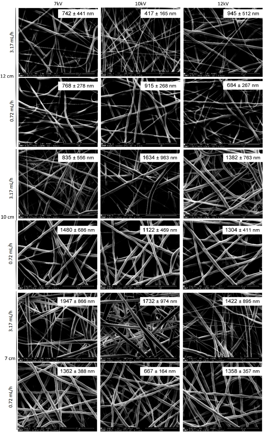 Struktuurid